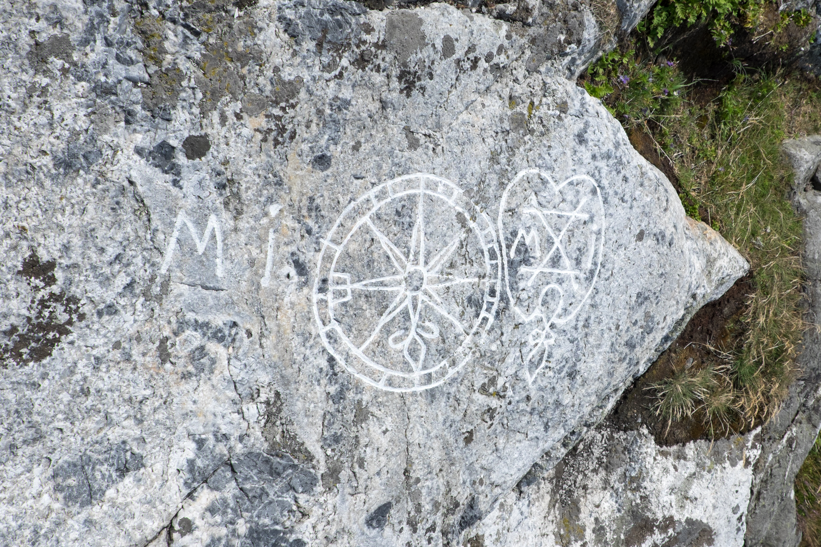 Stenristning, Väderöarna, Bohuslän